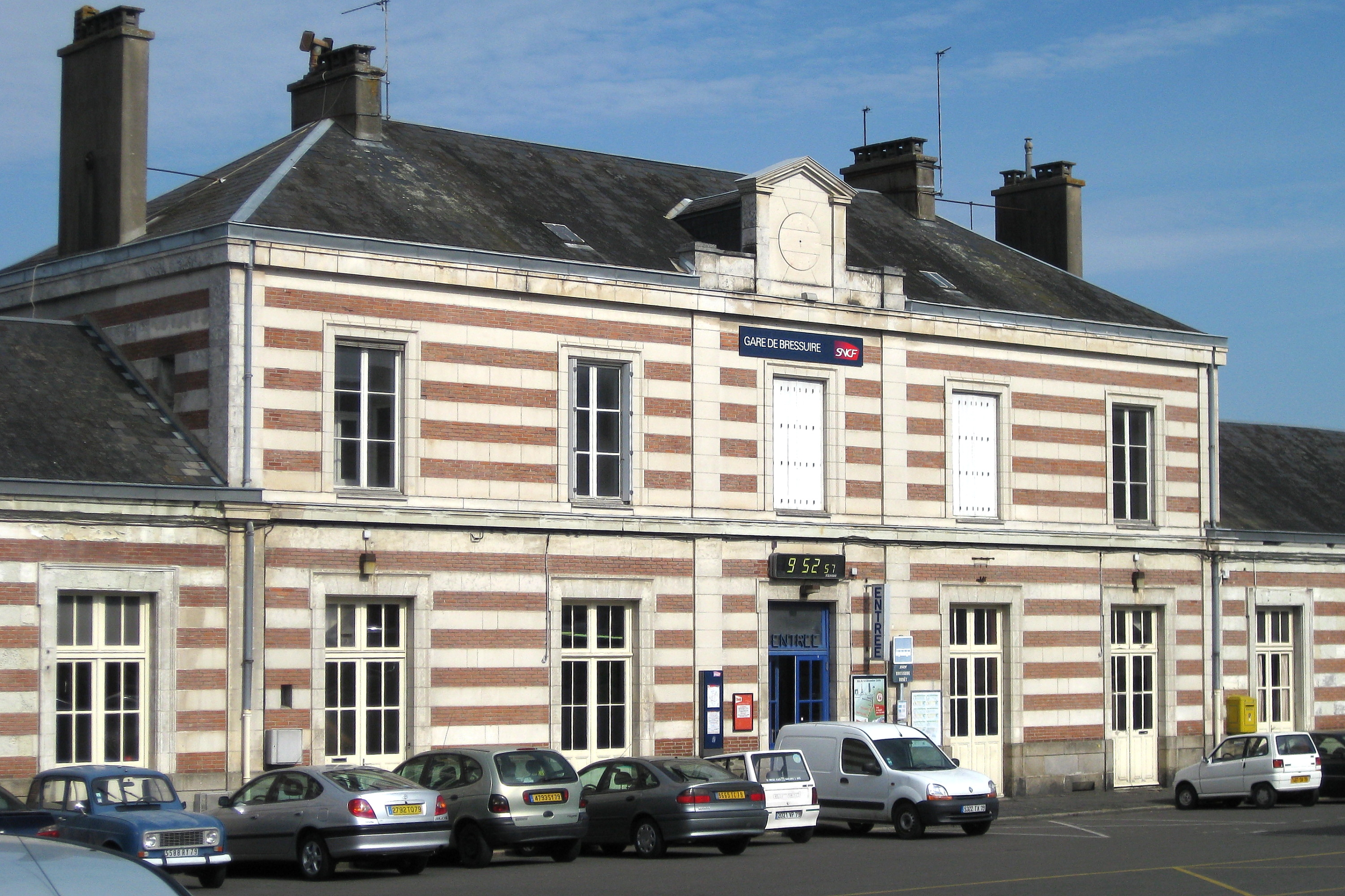 Bâtiment voyageurs de la gare de Bressuire vu côté cour.